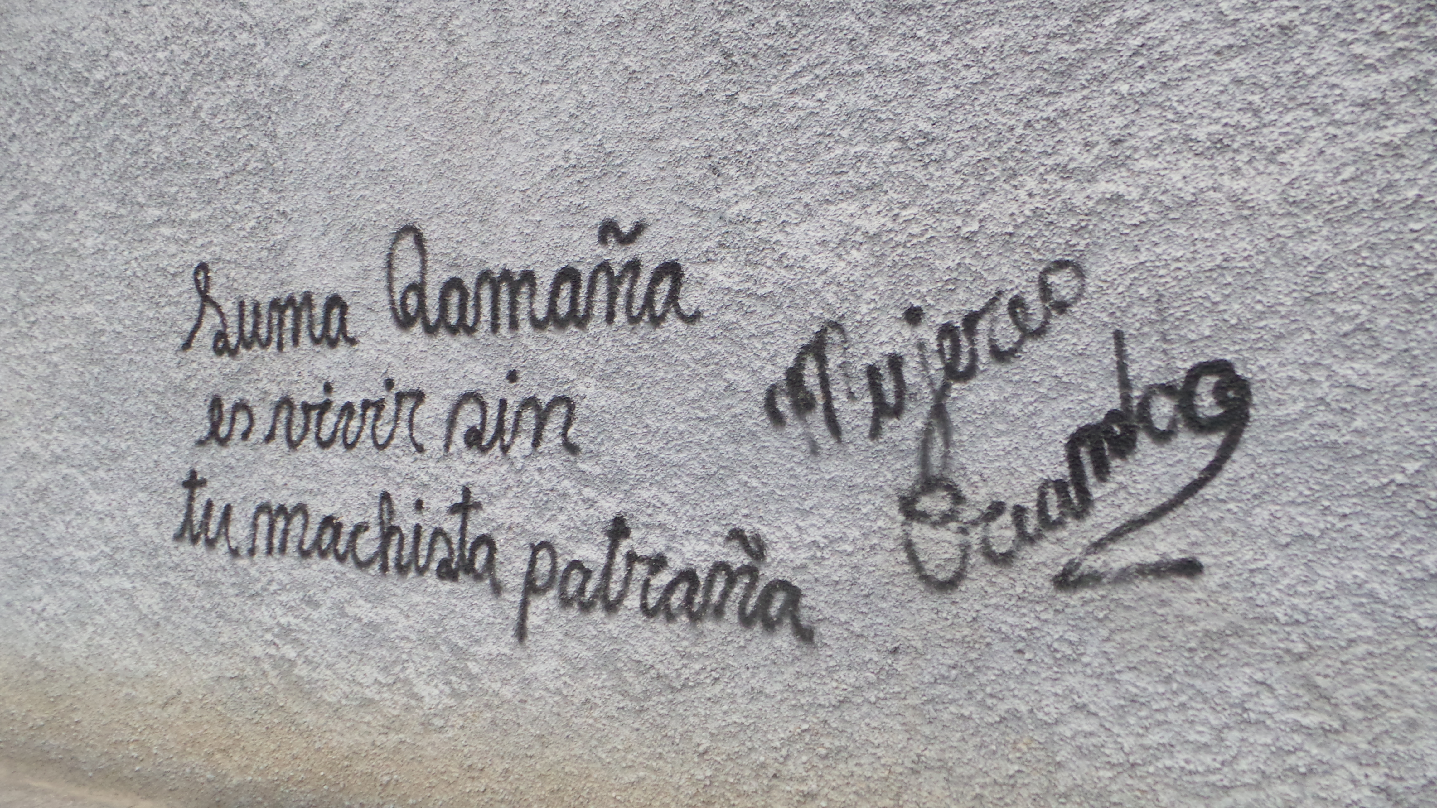 Fachada pintada en ciudad de La Paz de Mujeres Creando